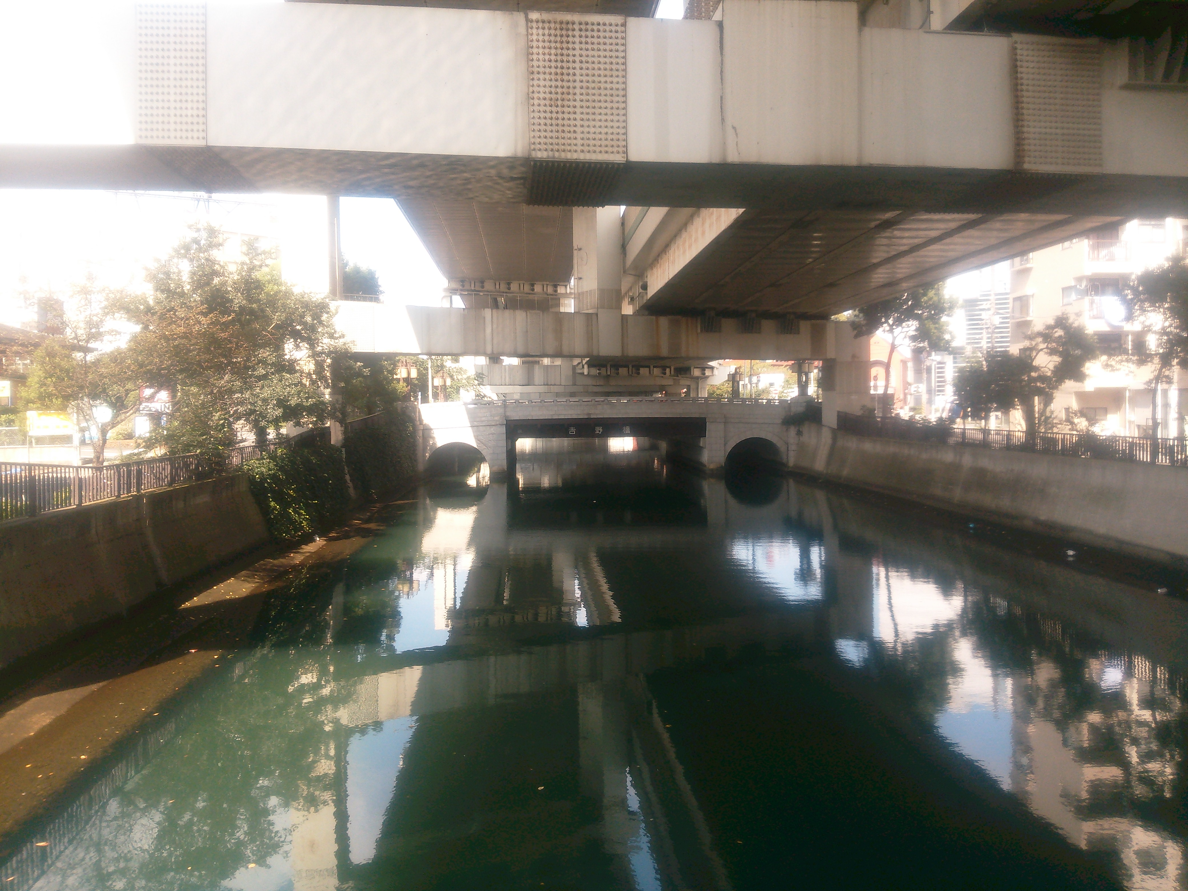 横浜市南区、吉野橋